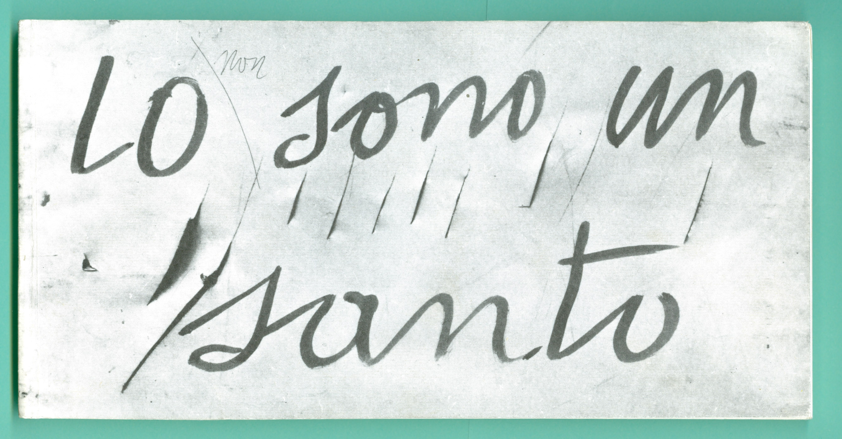 Kunstenaarsboek. [A cura di Vincenzo Ferrari e Carla Pellegrini Rocca]. - Uitgever: Milano : Galleria Milano, 1980. - [40] p. : ill. ; 11x21 cm. - Omslagtitel. - Uitgave ter ere van L. Fontana, georg. door de Associazione Italiana Gallerie d'Arte Contemporanea. - Oplage van 1000 genumm. ex. Nr. 133/1000. Korte teksten en tekeningen. Op elke pagina 2 kleine foto's van streepjes. Collectie Gelderland.